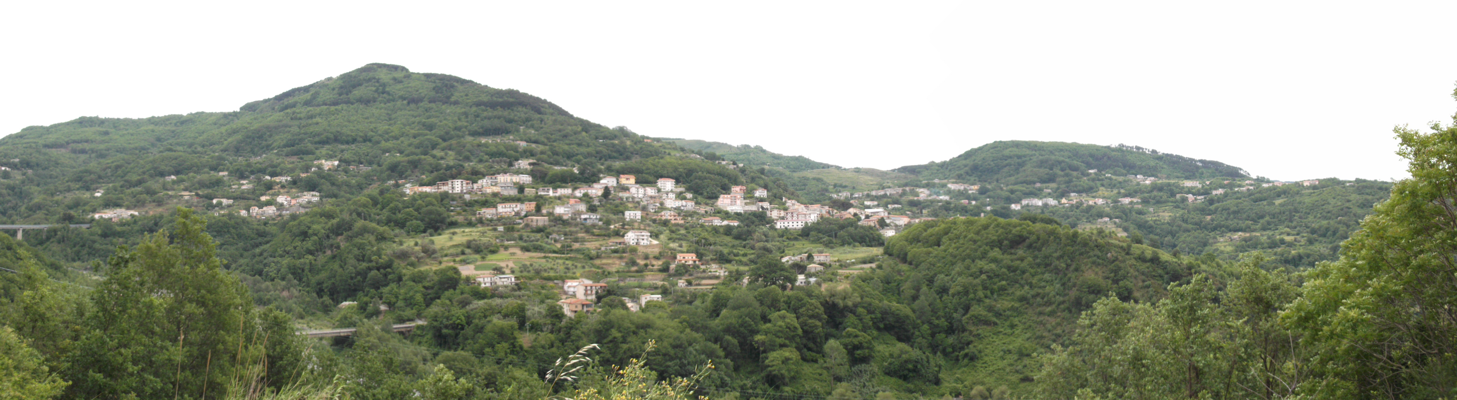 Panorama paesaggistico di Lago (Italia)